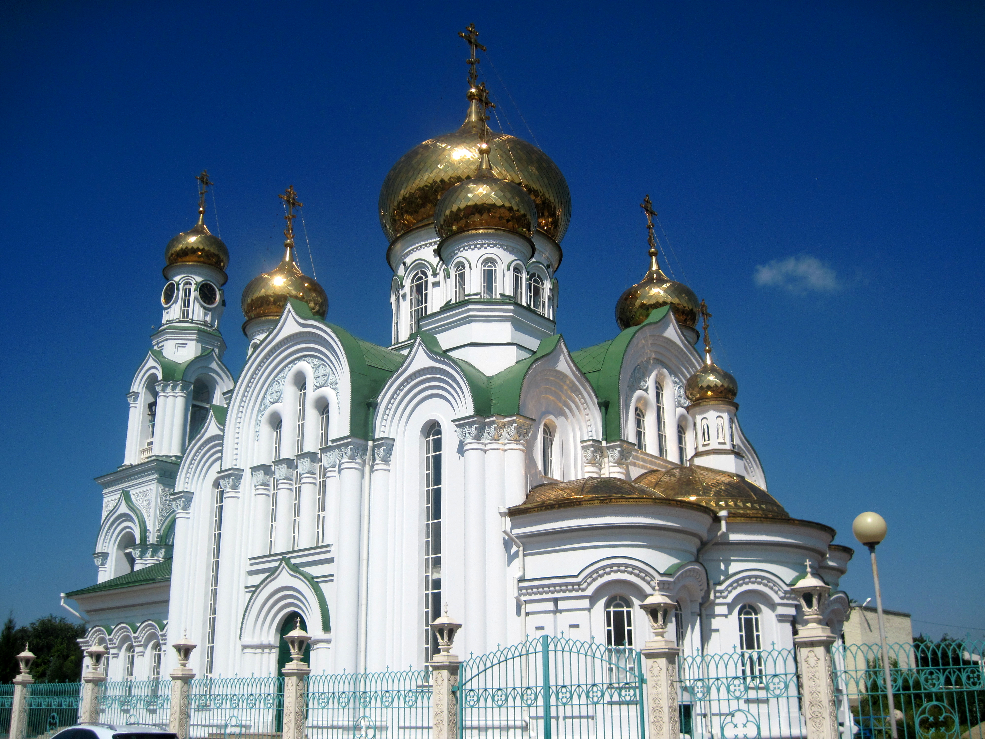 Храм Святой Троицы: площадь Андрея Первозванного, 1, Батайск, Новочеркасск, Ростовская область